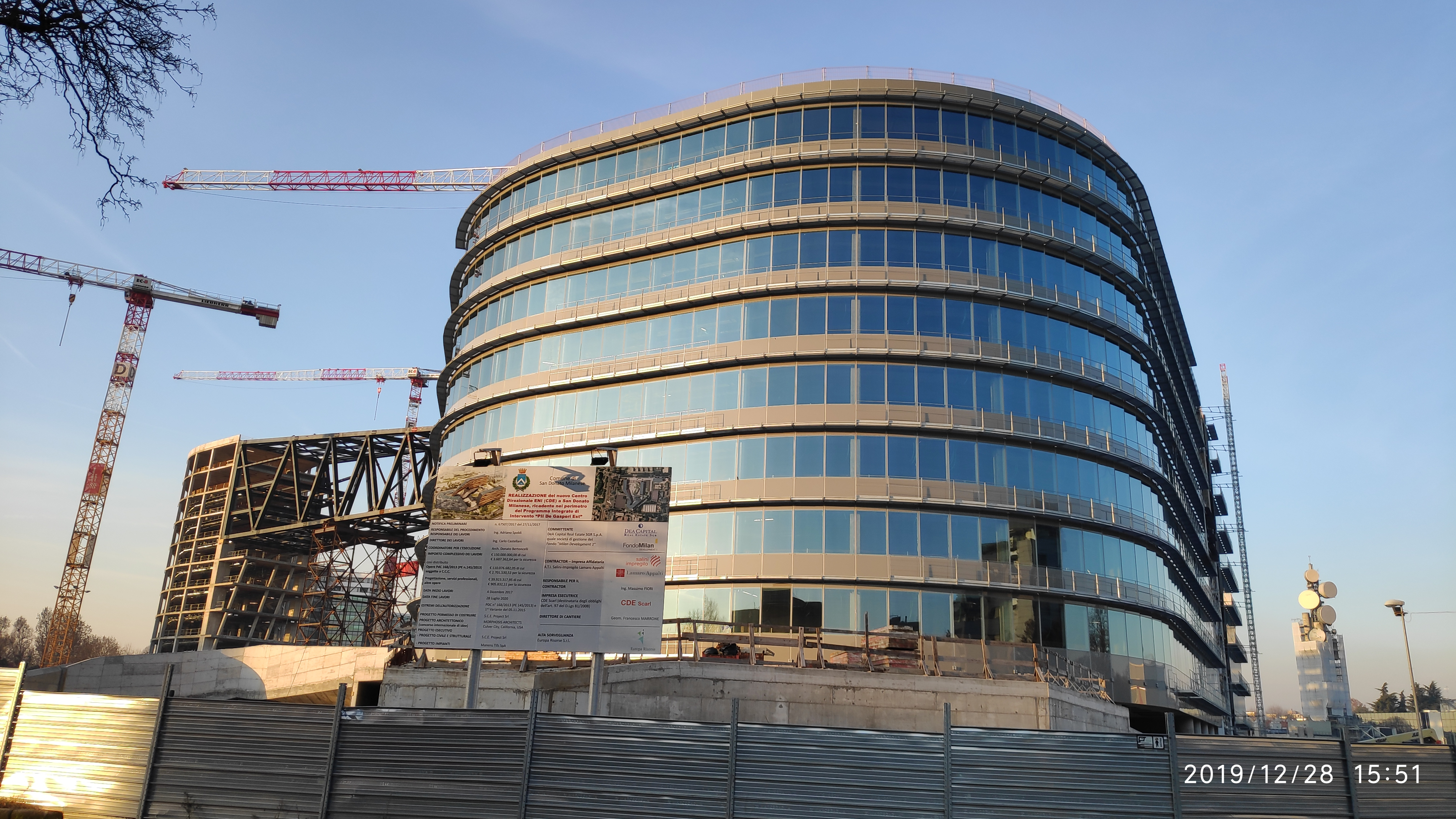 Cantiere ENI lato est (dicembre 2019)